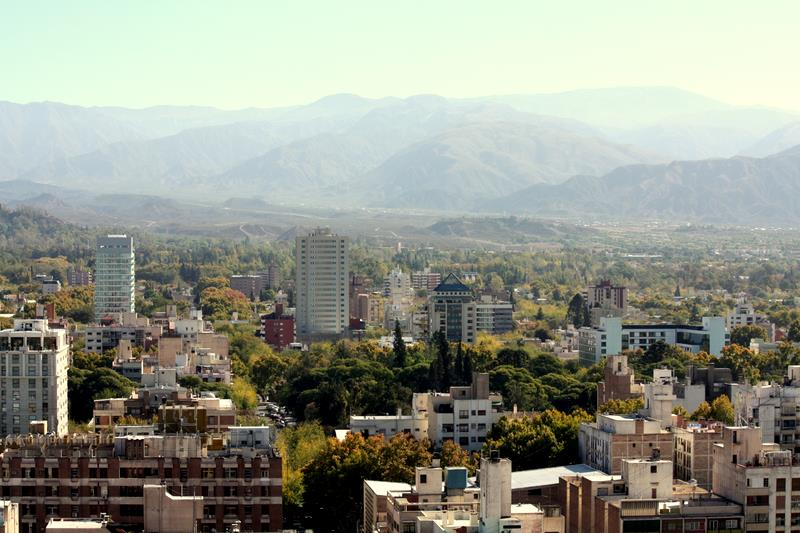 Ciudad de Mendoza, Argentina Photo is attached to GPSed track Mendoza Ruta del Olivo